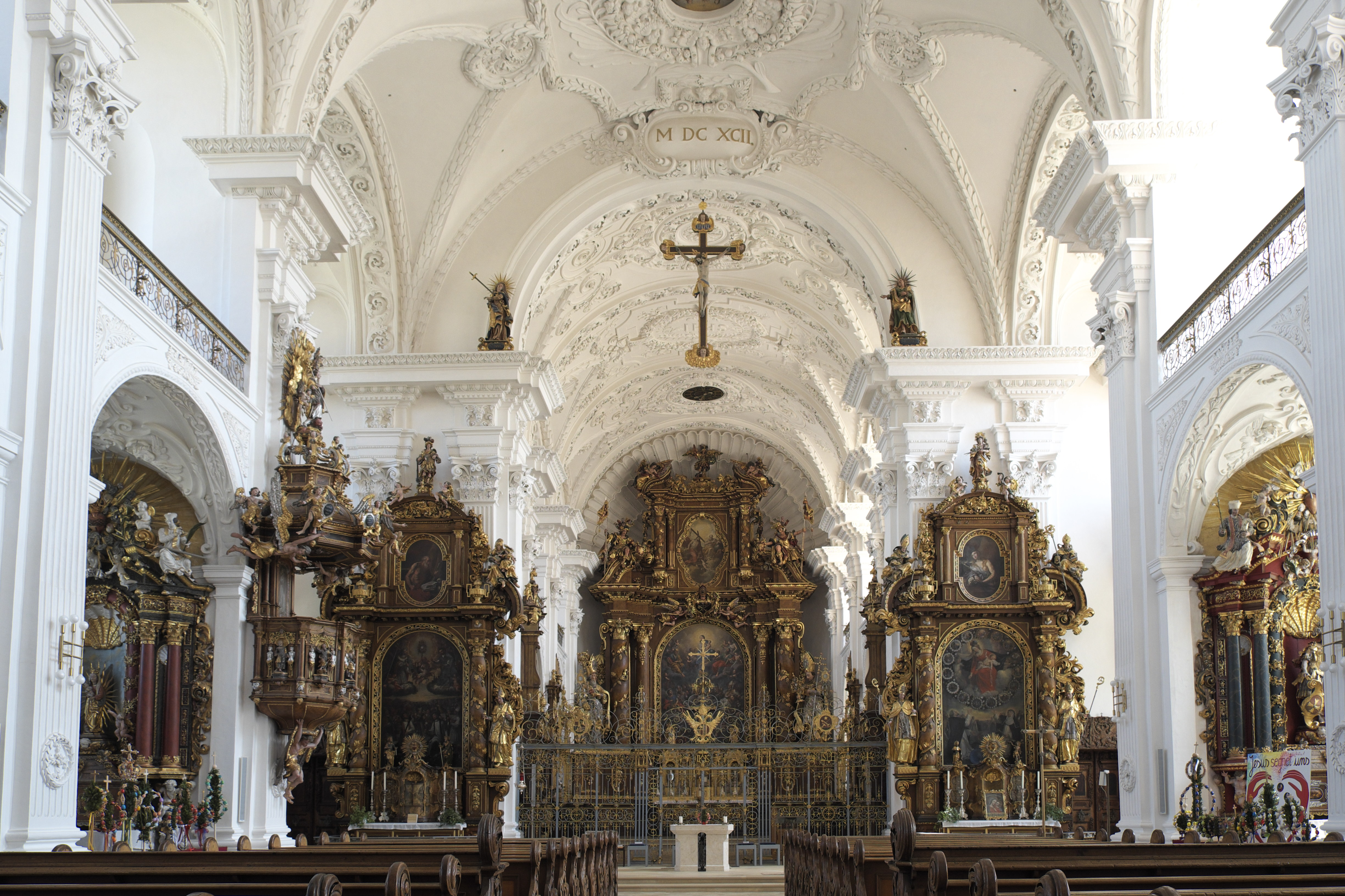 Ehemalige Prämonstratenserstiftskirche, Münster St. Peter und Paul, in Obermarchtal im Alb-Donau-Kreis (Baden-Württemberg/Deutschland), Innenraum